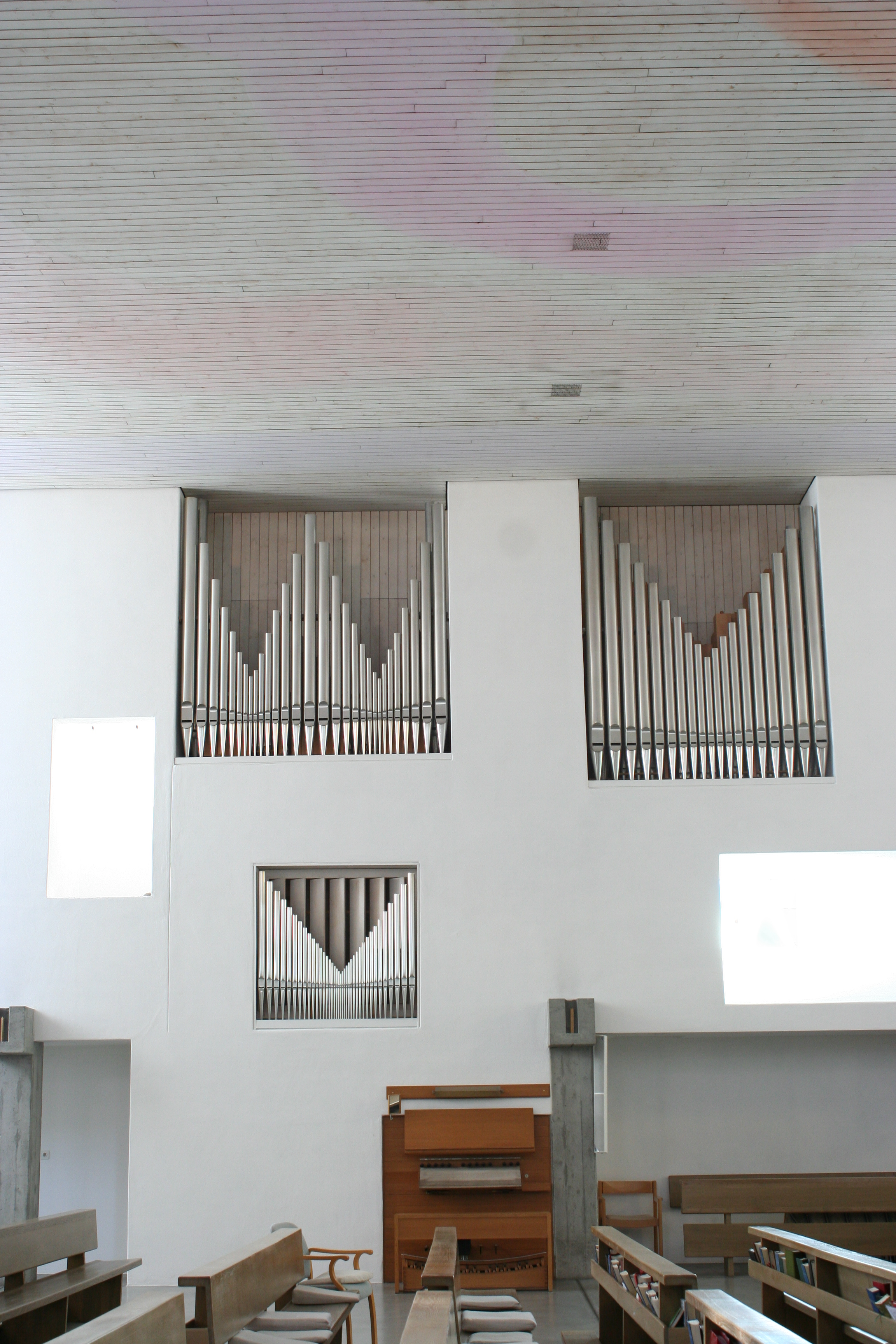 Kloster Ilanz Orgel von Mathis